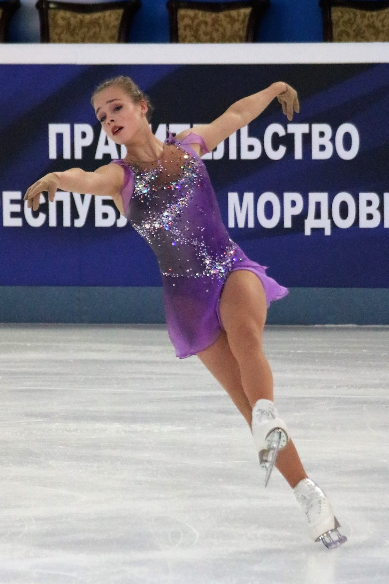 Анастасия Губанова на чемпионате России по фигурному катанию на коньках 2019